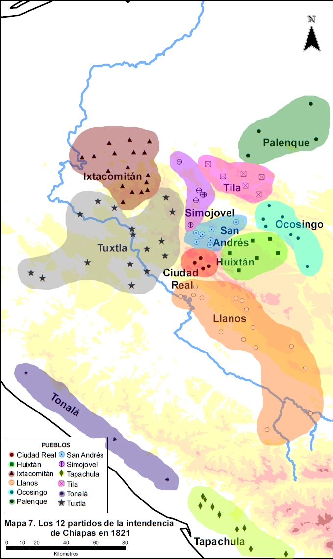 Representación de las doce subdivisiones que tuvo la intendencia de Chiapas a principios del siglo XIX